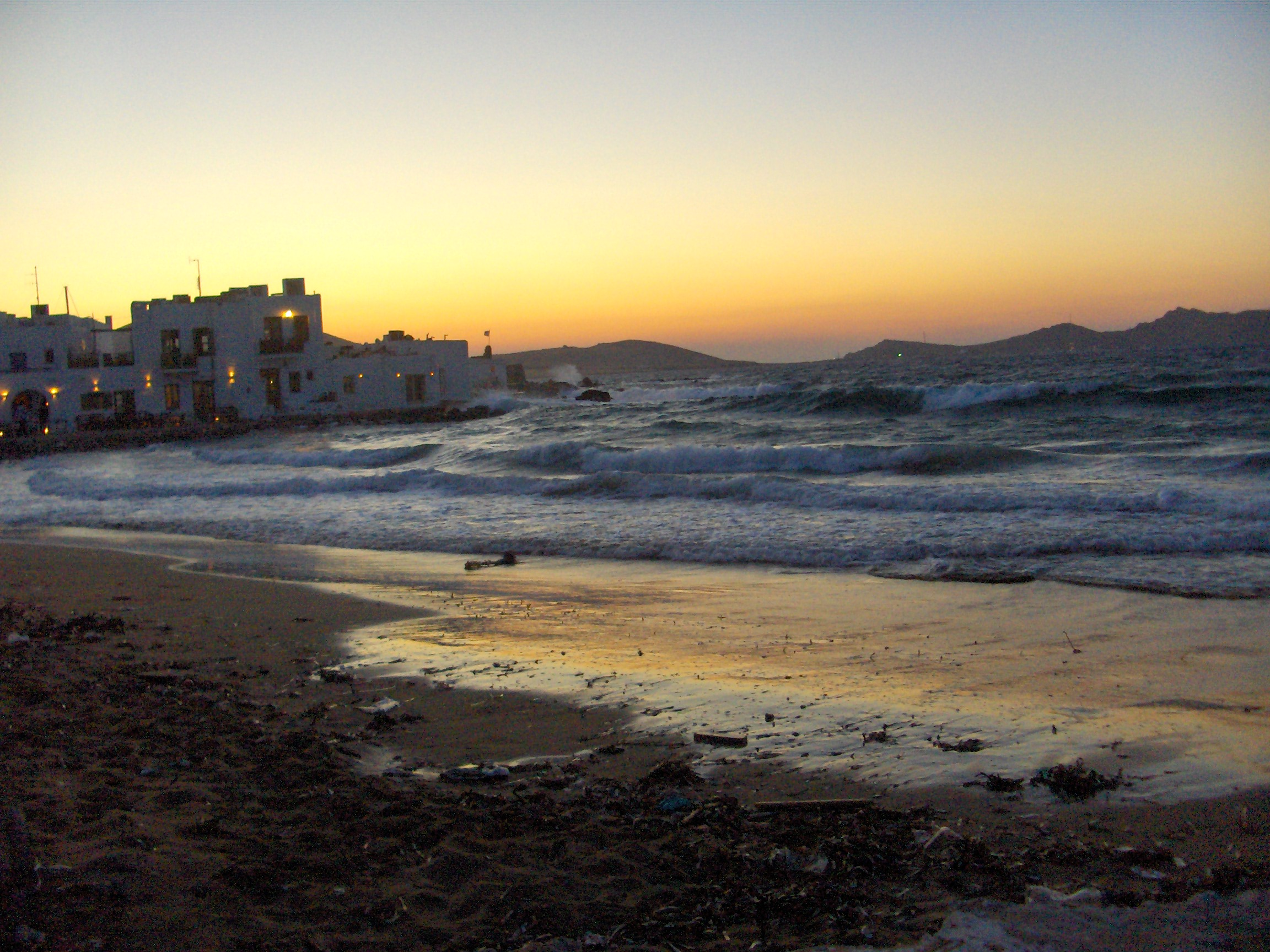 Sunset in Naoussa, Paros island, Greece.